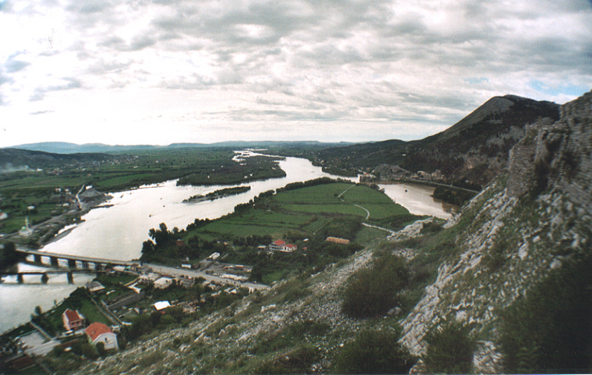 Beschreibung: Zusammenfluss von Drin (links) und Bojana (rechts) westlich von Shkodra. Blick von der Burg nach Süden Richtung Adria. Quelle: selber fotografiert im Oktober 2003 Fotograf: L. Haefner Lizenzstatus: GNU FDL